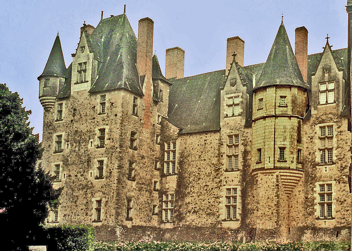 Château de Baugé, 15è siècle